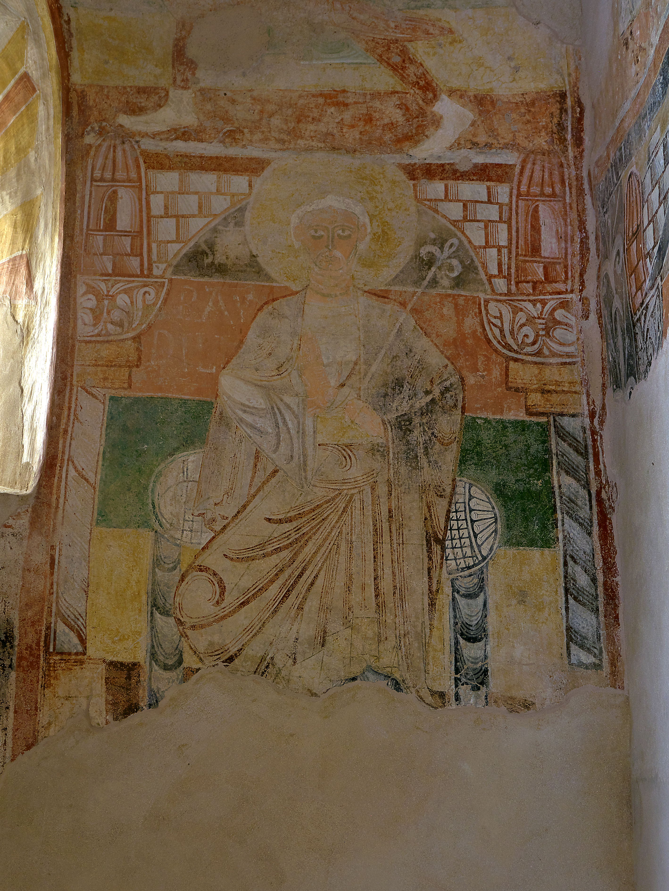 Ermita de San Baudelio de Berlanga. Pintura (s. XII) de San Baudelio, titular de la ermita mozárabe, en el ábside de la misma.